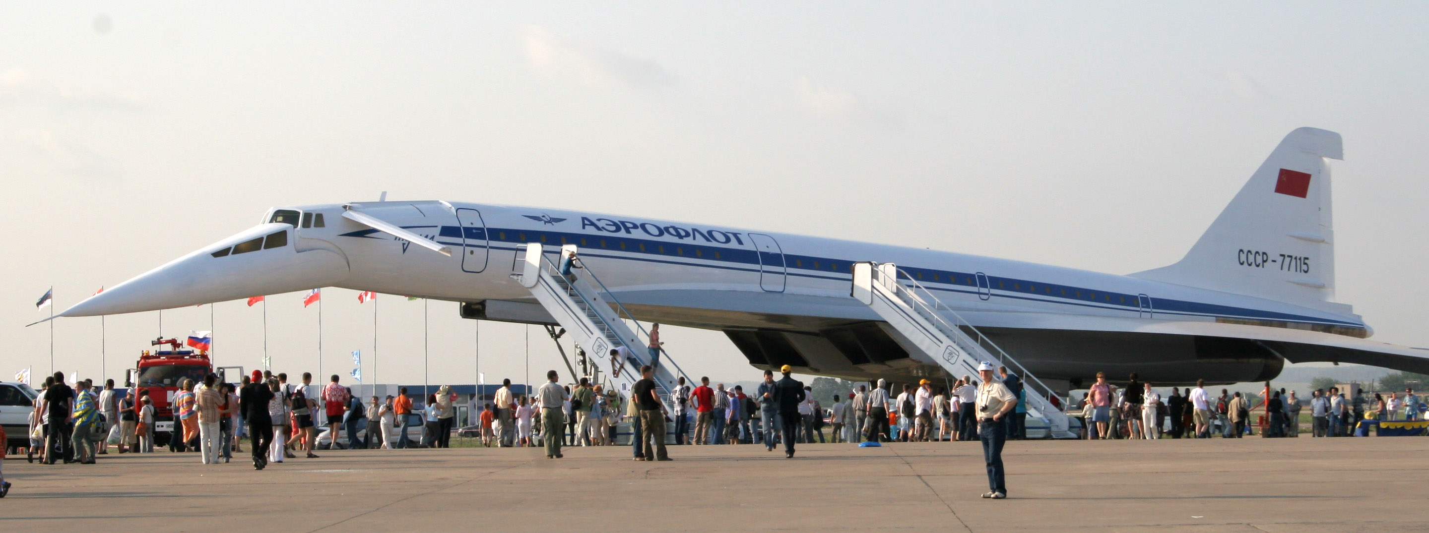 Elizeu cardoso de oliveira